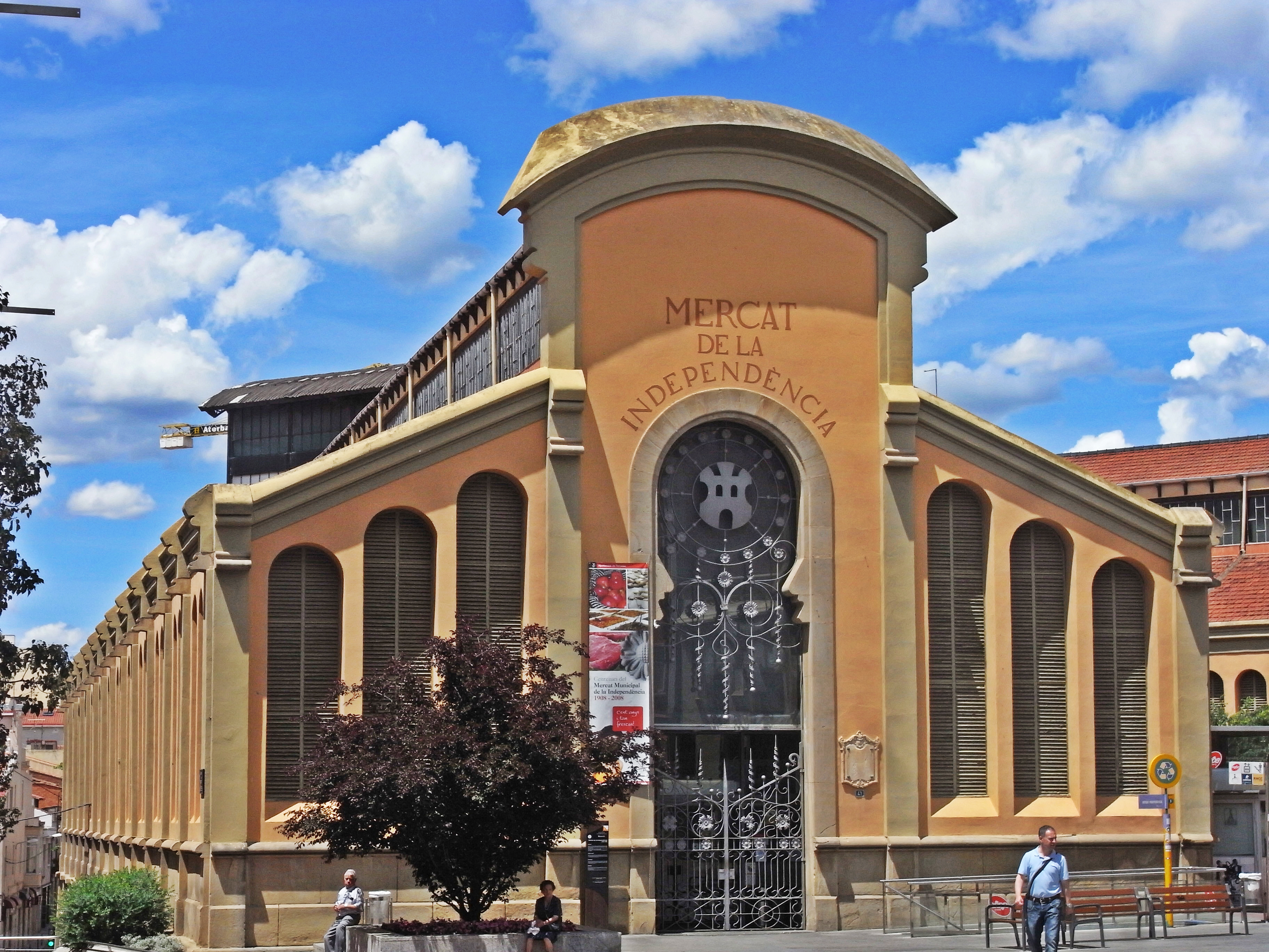 Mercat a Terrassa